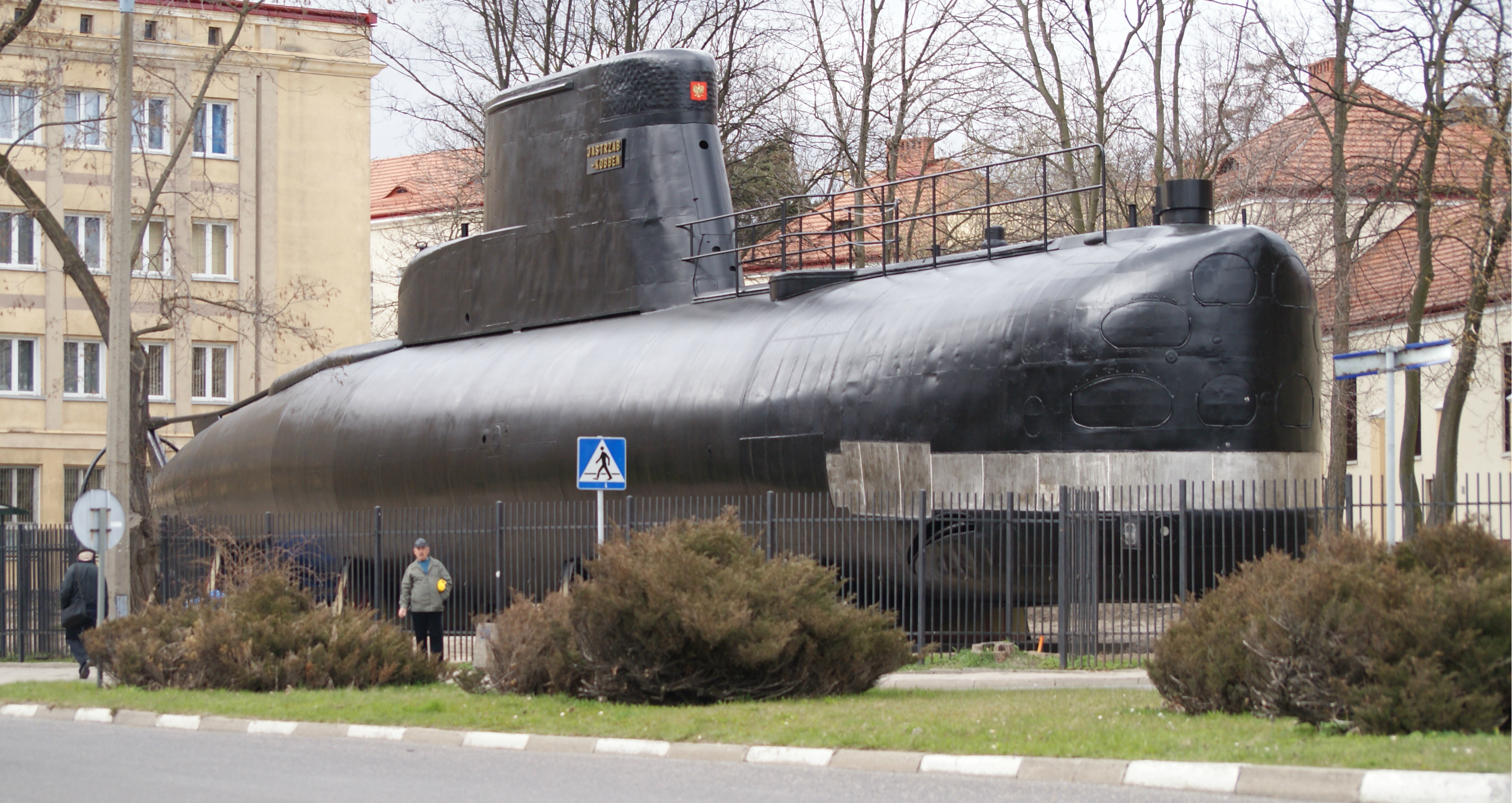 Okręt podwodny typu Kobben (nieoficjalna nazw „Jastrząb-Kobben") przeniesiony został na teren Akademii Marynarki Wojennej w 2011 roku. Funkcjonuje jako symulator, wyposażony w laboratoria i stanowiska badawcze. Jednostka waży 370 ton, ma 45,5 metra długości, 4,6 metra szerokości i 8,9 metra wysokości. Okręt przypłynął do Polski z Norwegii w 2002 roku jako jedna z pięciu jednostek tego typu. Wykorzystywany był jako baza części zamiennych.